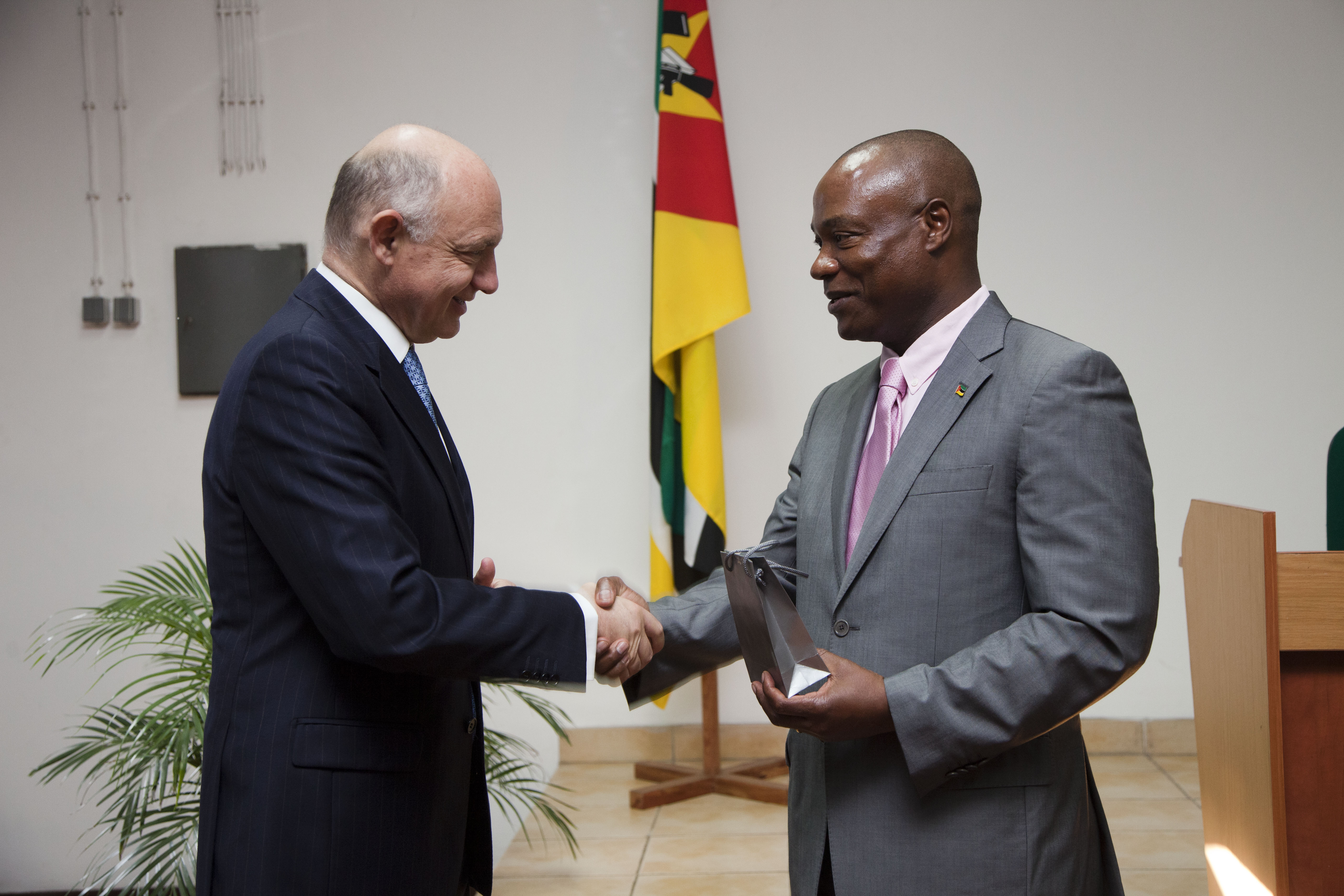 Mozambique, Maputo. Marzo 8 de 2012 El Canciller Héctor Timerman fue recibido por el Ministro de Agricultura de Mozambique, José Pacheco